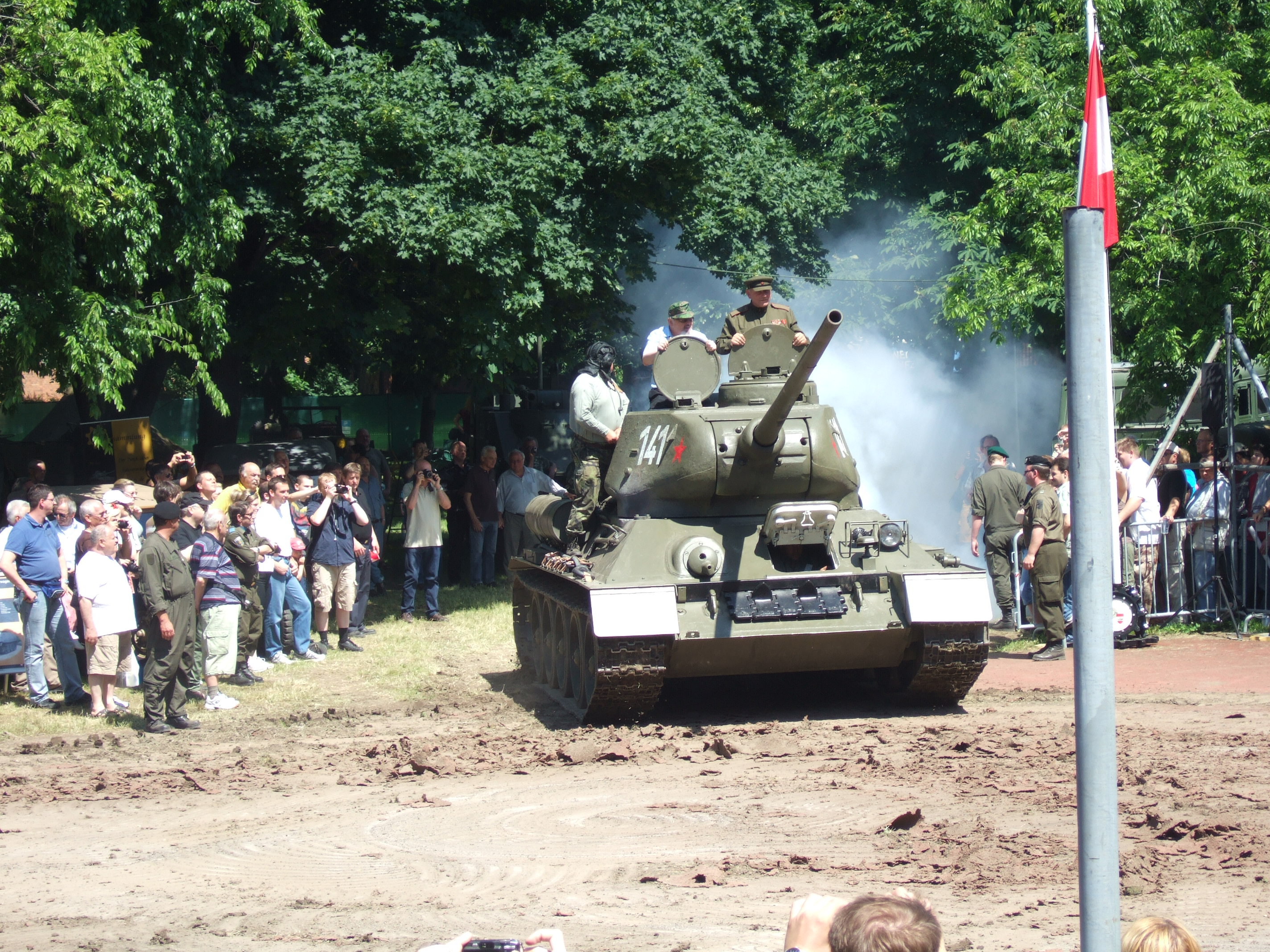 Fahrbereiter T-34 Kampfpanzer bei einer Vorführung der Veranstaltung "Auf Rädern und Ketten" im Heeresgeschichtlichen Museum in Wien.